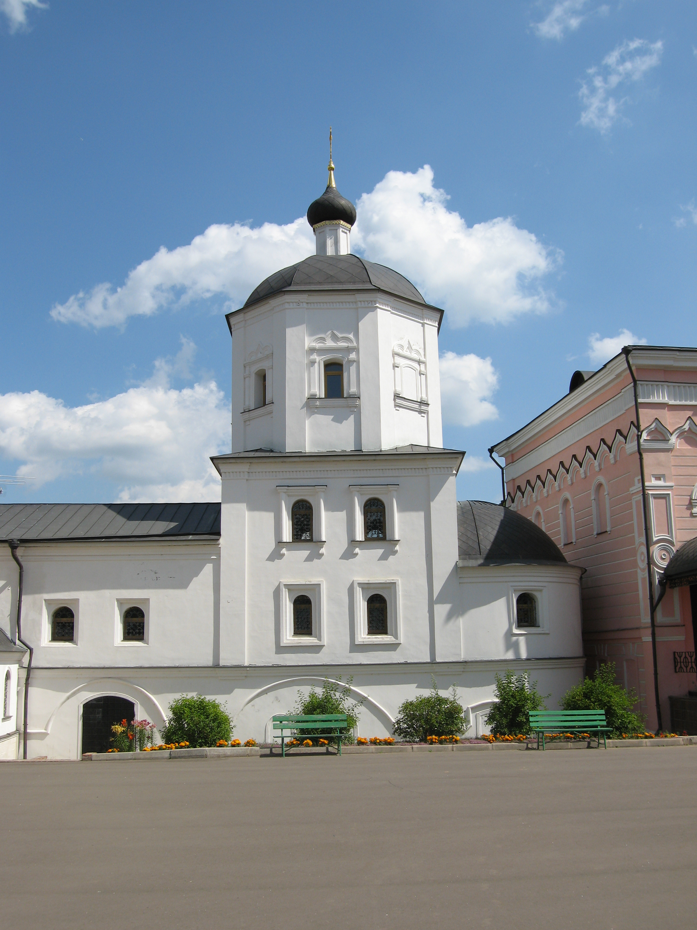 Давидова пустынь. Церковь Успения Пресвятой Богородицы.